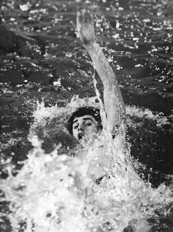 Roland Matthes Zentralbild Sindermann 19-12-70-Halle-Neustadt: Mehrkampfpokal im Schwimmen (am 19. und 20.12.70)-Pokalverteidiger bei den Herren ist Roland Matthes (SC Turbine Erfurt-Archivfoto), der bereits 1967 siegte und nun den dritten Erfolg anstrebt. (als Arbeitsmaterial verwenden).